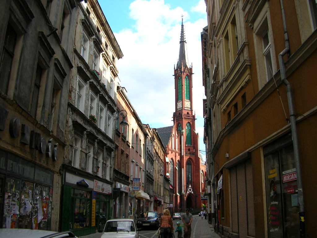 Wałbrzych - Kościół pw.Aniołów Stróżów.